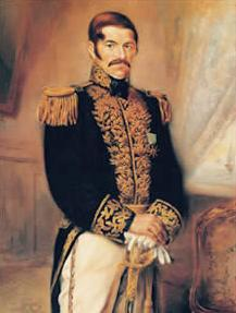 Luis Brión,Almirante venezolano,retrato realizado por Antonio Esteban Frías en 1913 y reposa en el salon eliptico del Palacio Federal en Caracas - Venezuela